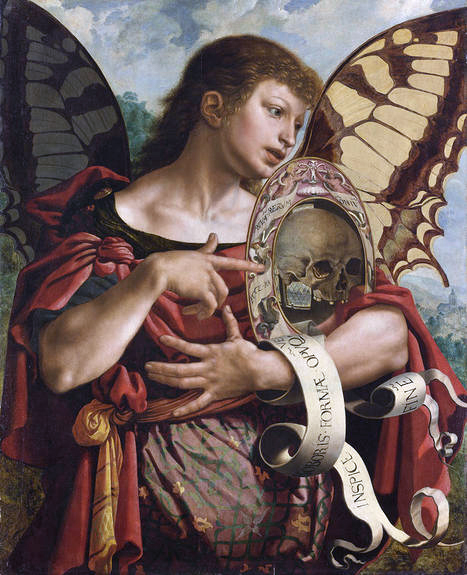 Vanitas